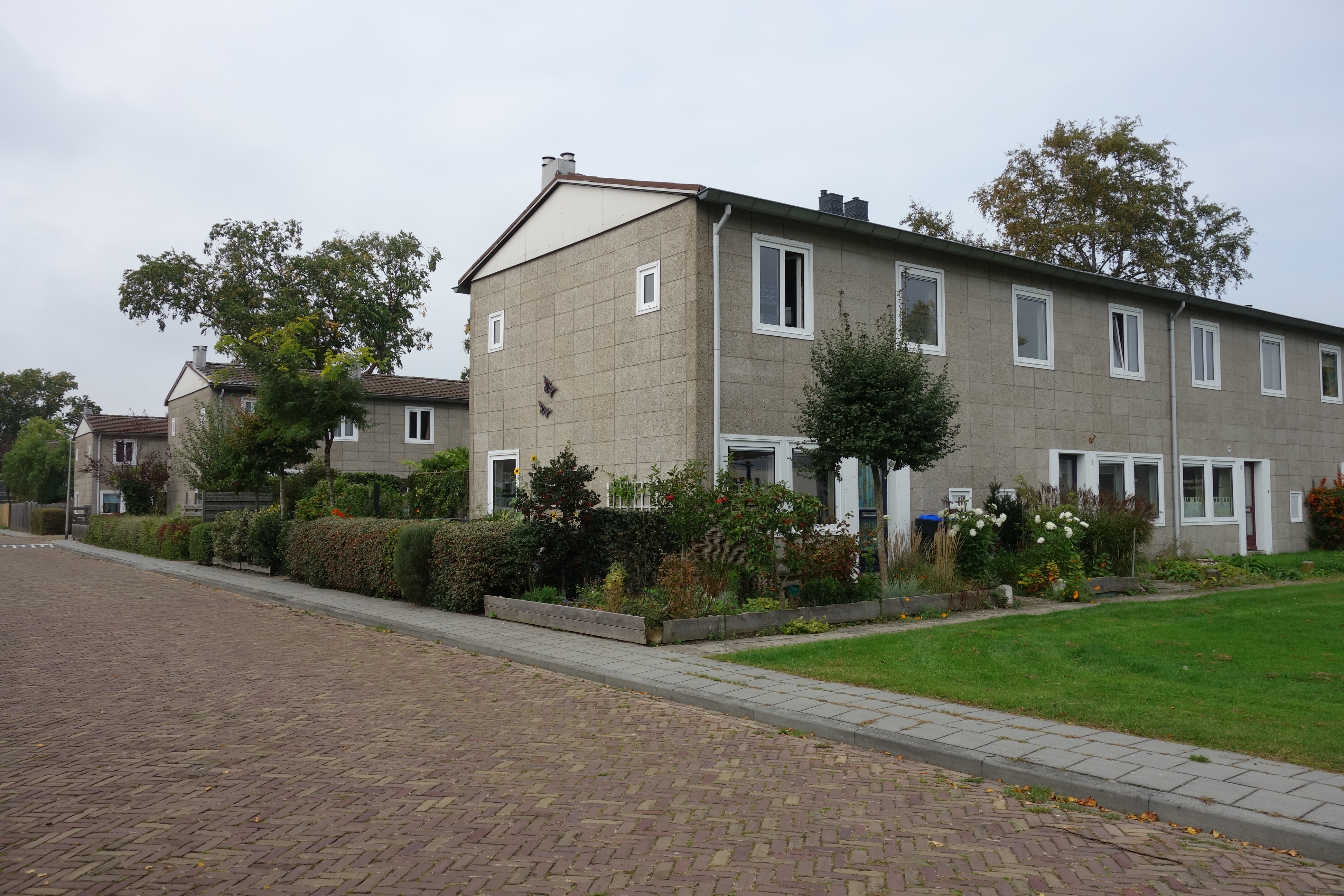 Voorste blok op de foto behoort tot de Witte de Withstraat in Meppel. De twee daar achter tot de Trompstraat. De buurt is voorzien van Airey-woningen.